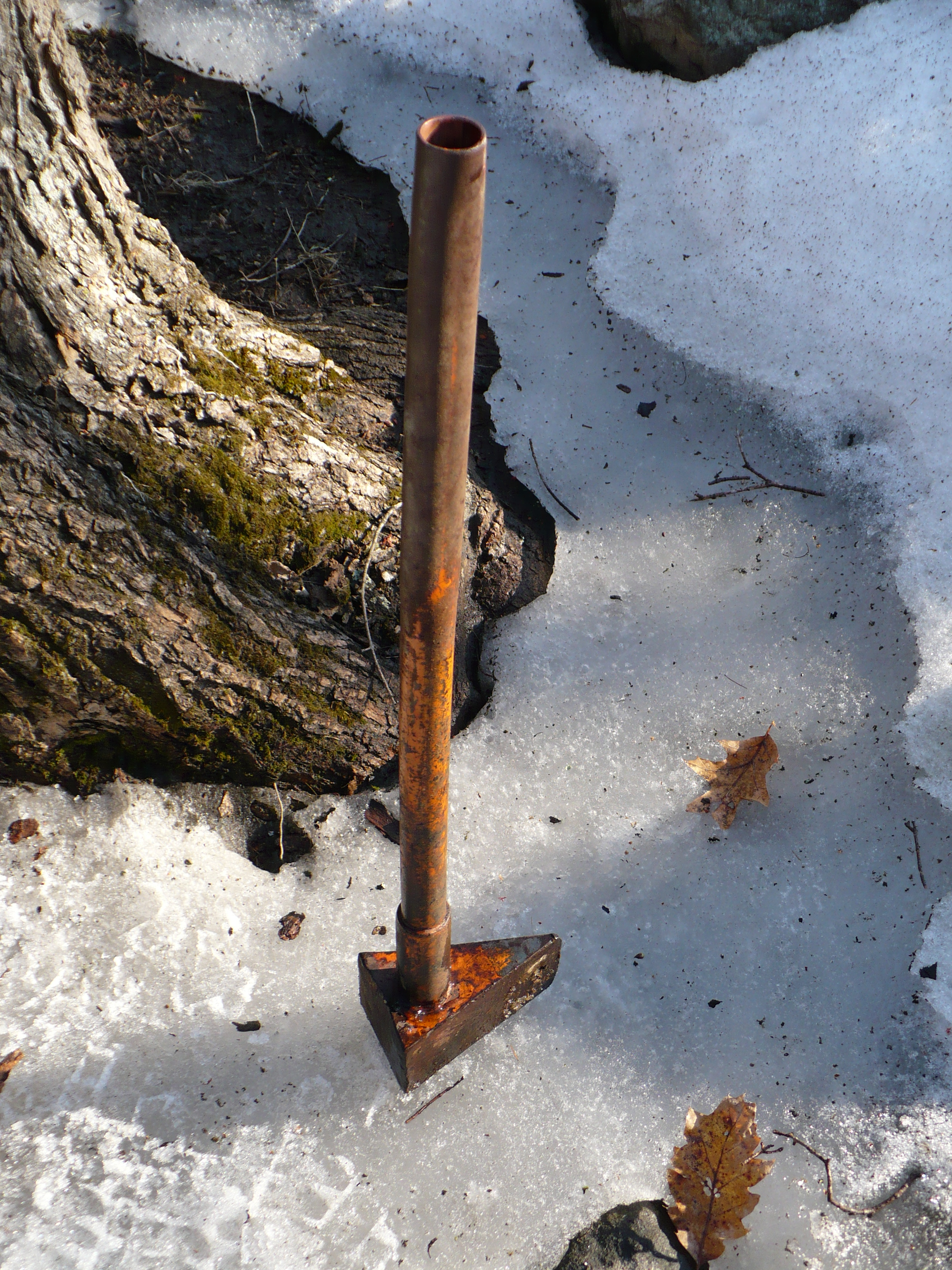 Monster Maul unbreakable splitting maul.